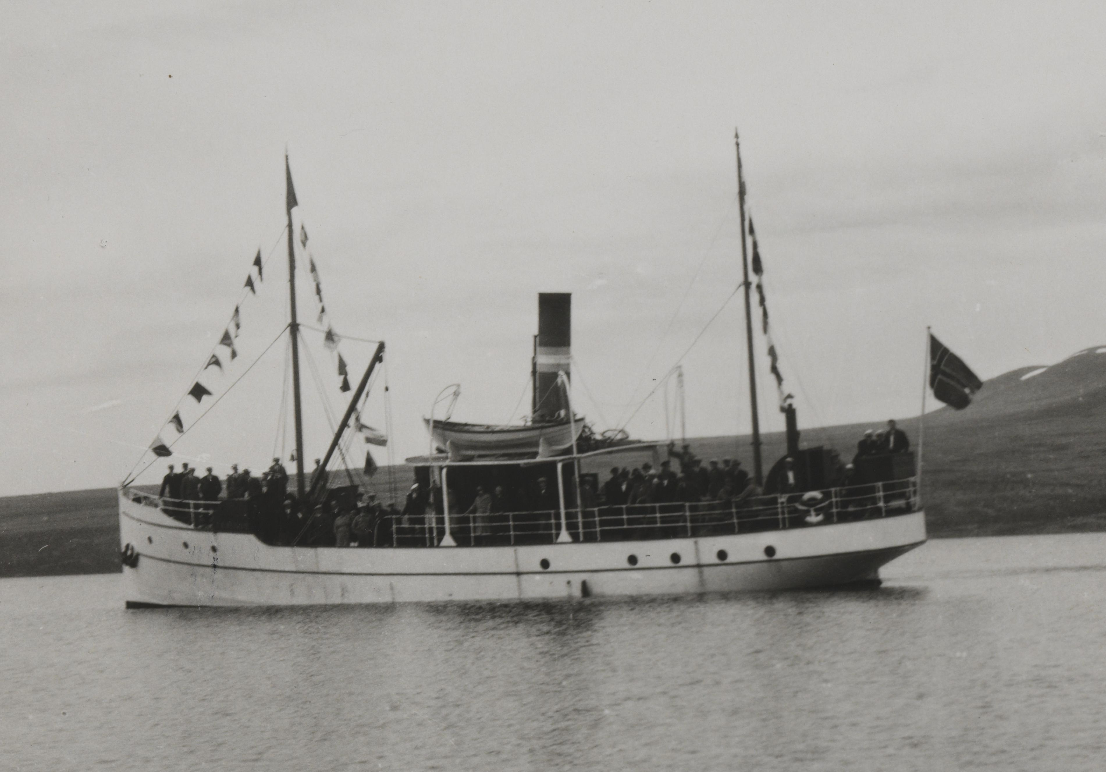 Bildet er hentet fra Nasjonalbibliotekets bildesamling Femundsmarka, Engerdal, Hedmark